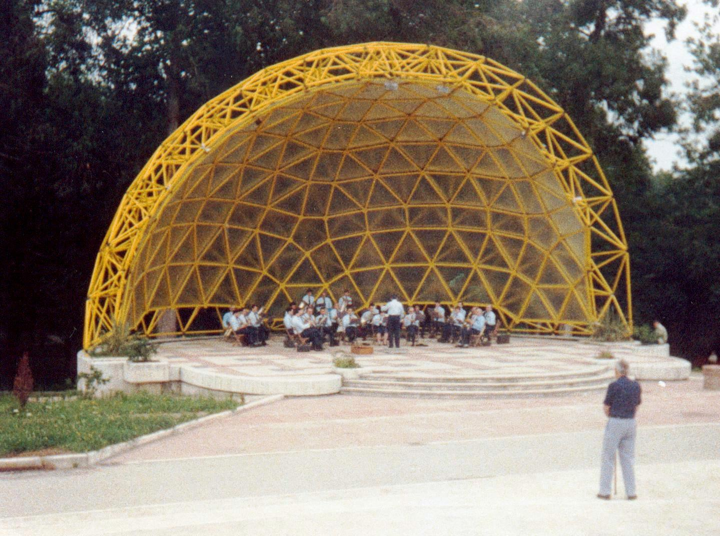 Structure métalique servant de pavillon. Restitution du son impressionnante. Torrelavega, Espagne. Orchestre d'harmonie en concert. cliché argentique un peu passé. Version numérique à venir.